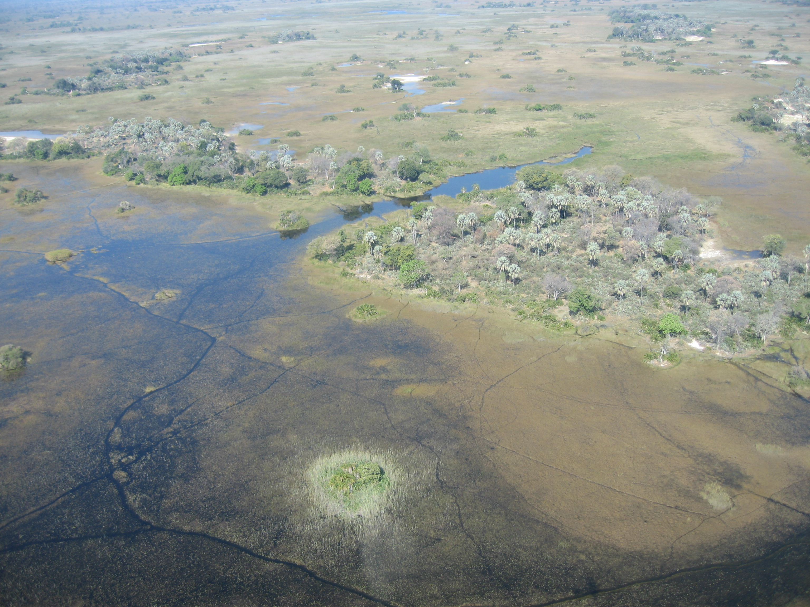 Delta del Okavango, vista aérea.